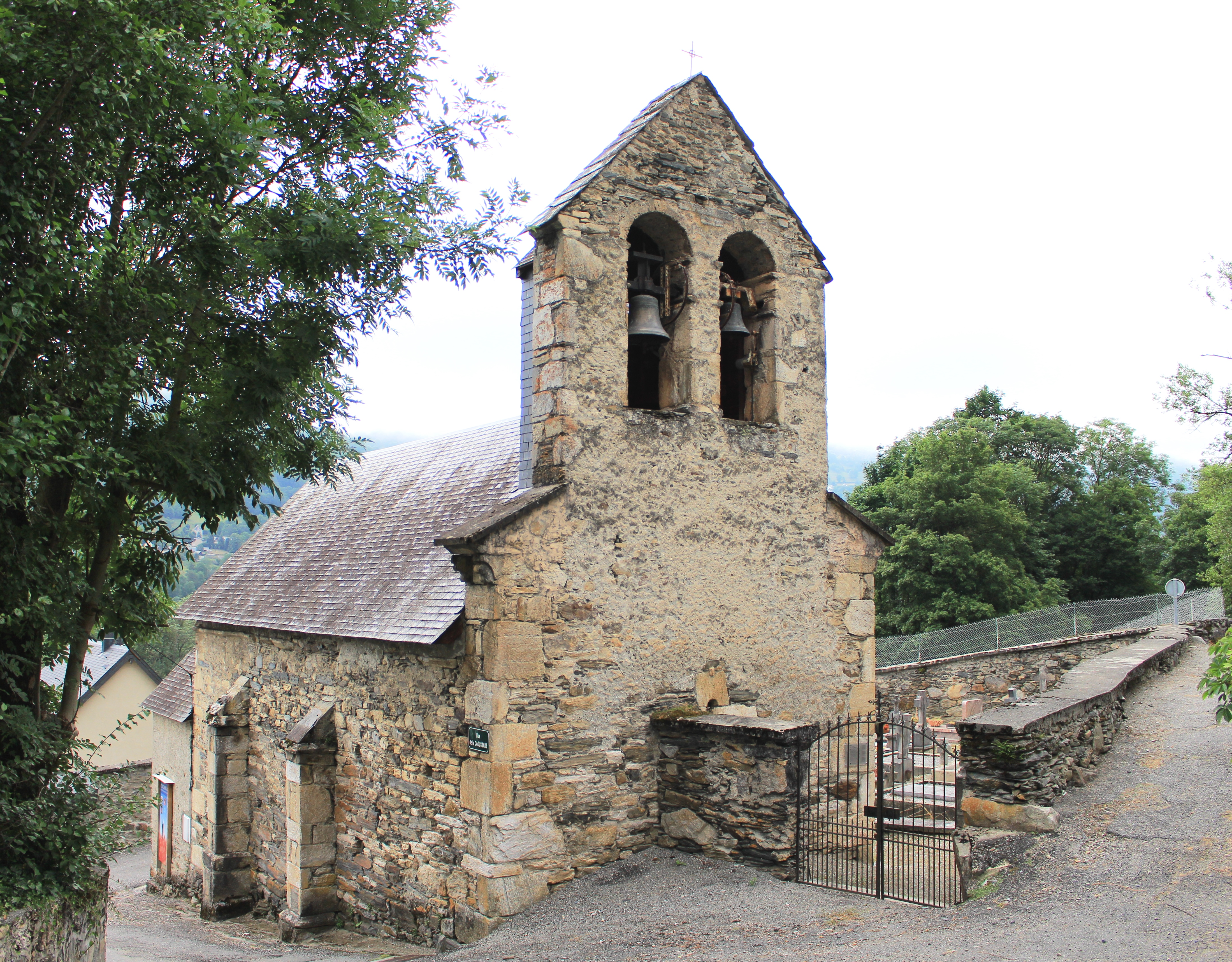 Église Saint-Laurent de Pouchergues (Hautes-Pyrénées)